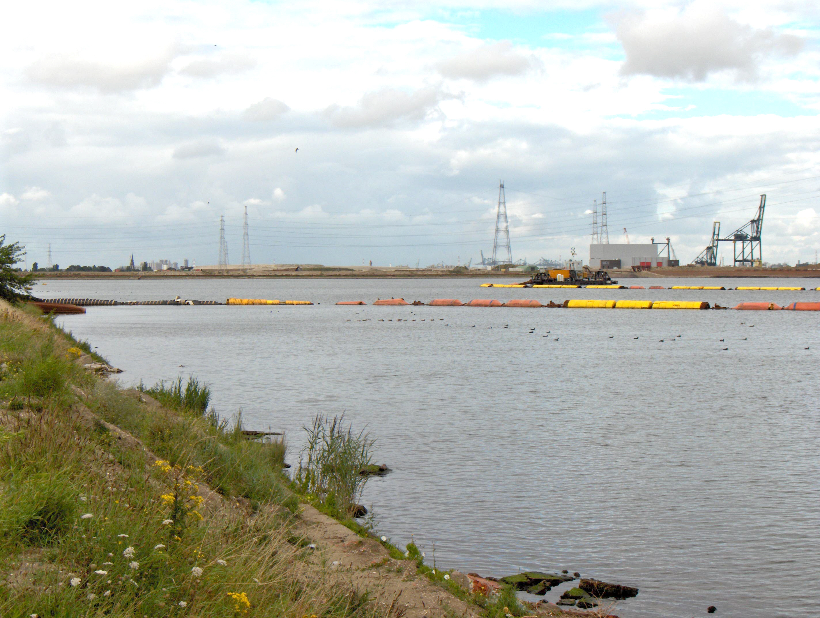 Bild: Doeldok, Hafen von Antwerpen (Waaslandhaven, Gemeinde Beveren), Blick vom Hogendijk, nordwärts Fotograf: Friedrich Tellberg Datum: 7. August 2005